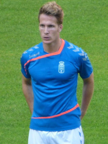 Néstor Susaeta en Julio 2015